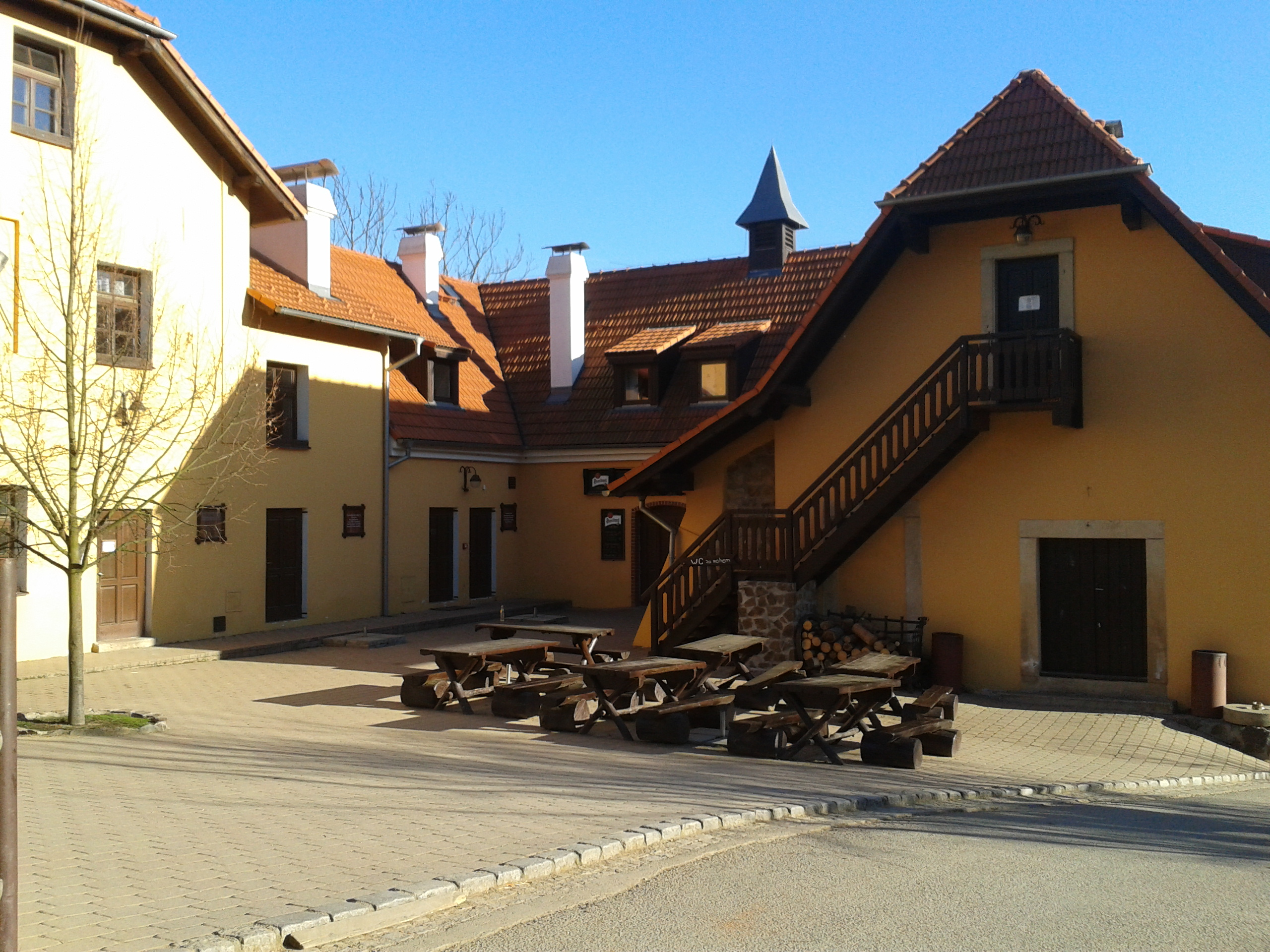 Statek Lüftnerka